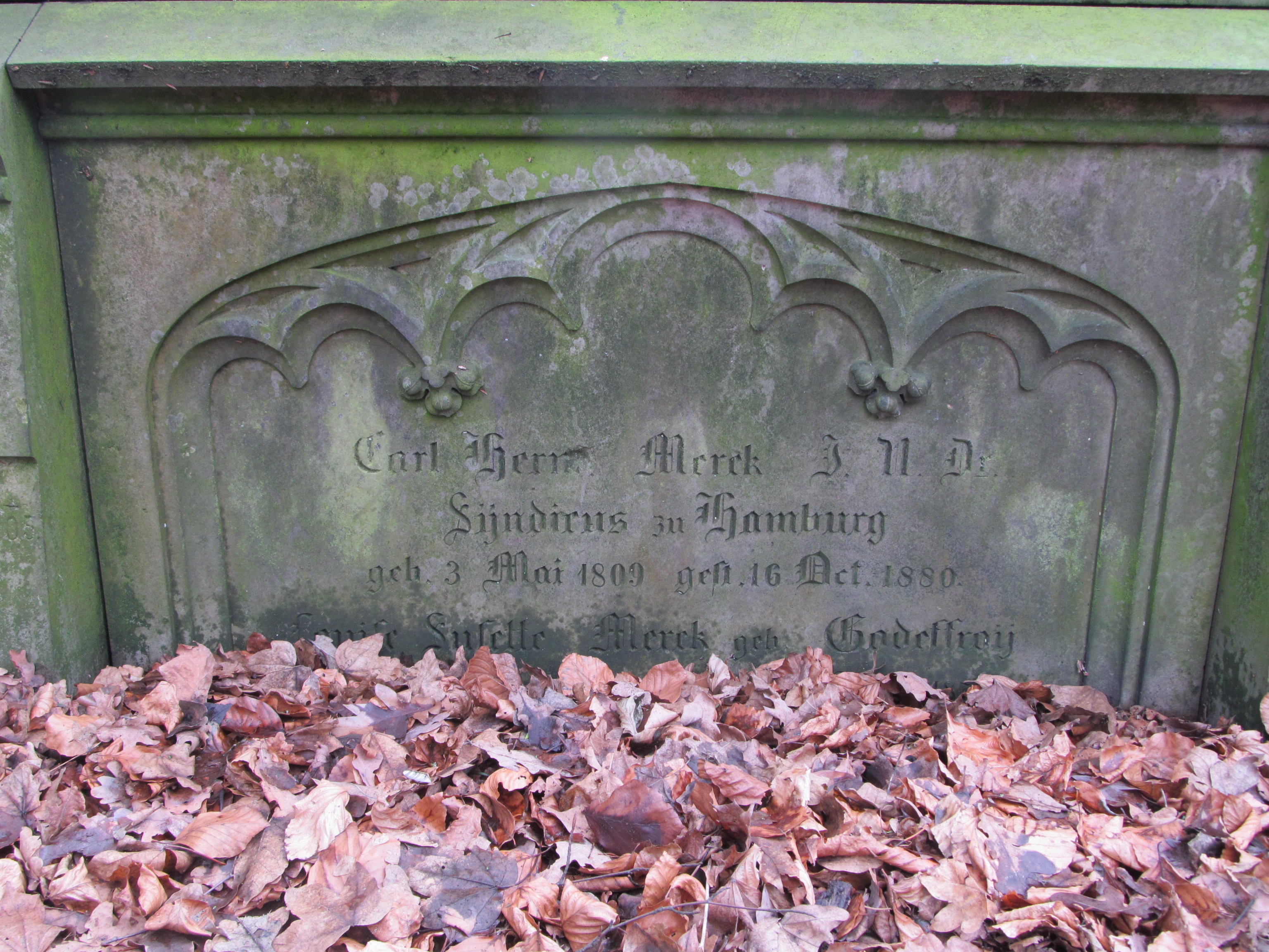 Familiengrabmal Merck im Jacobipark in Hamburg-Eilbek, Epitaph für Carl Hermann Merck (1809–1880), hamburgischer Syndikus und Politiker